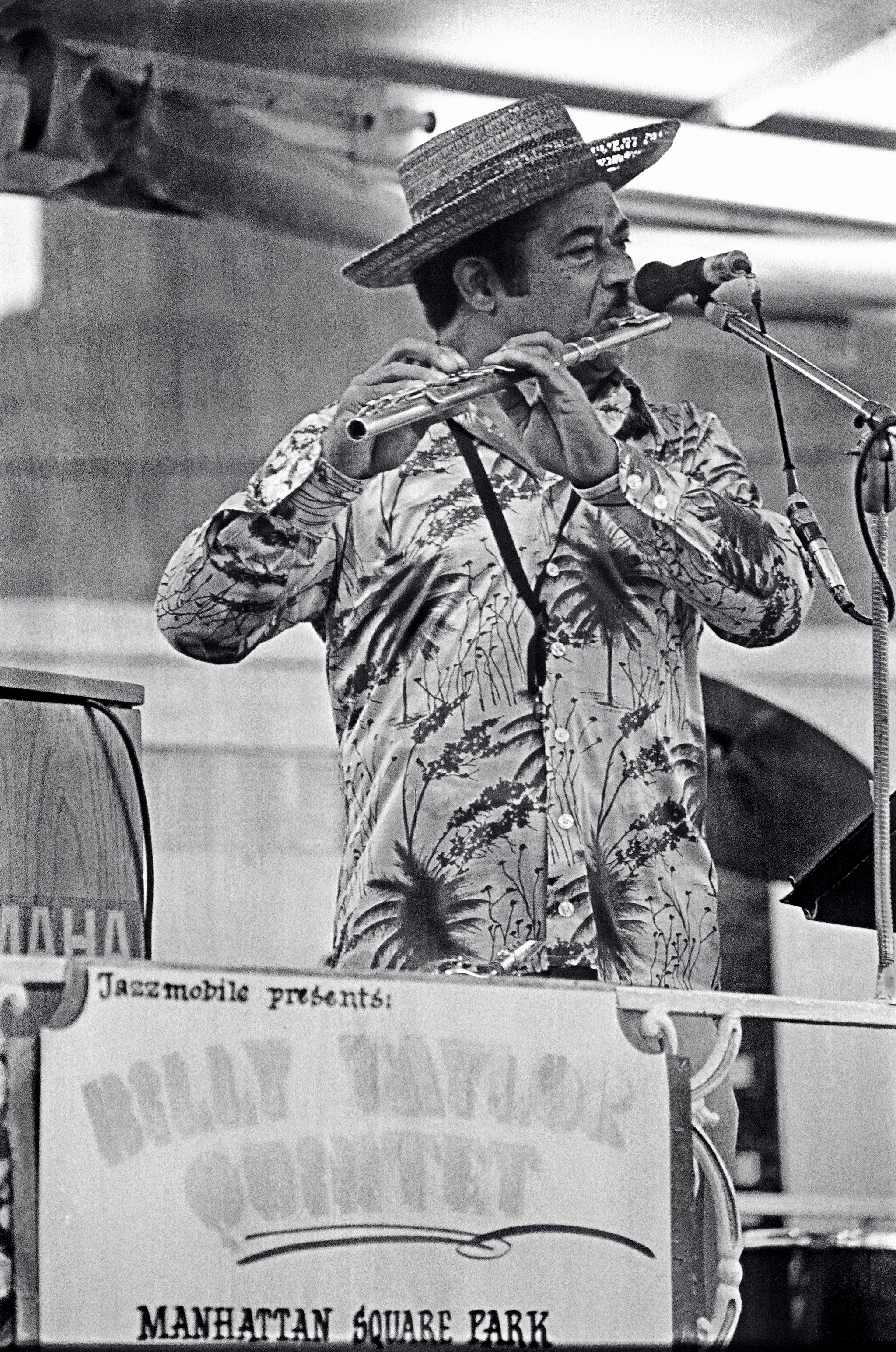 Frank Wess w/Jazzmobile (1977)